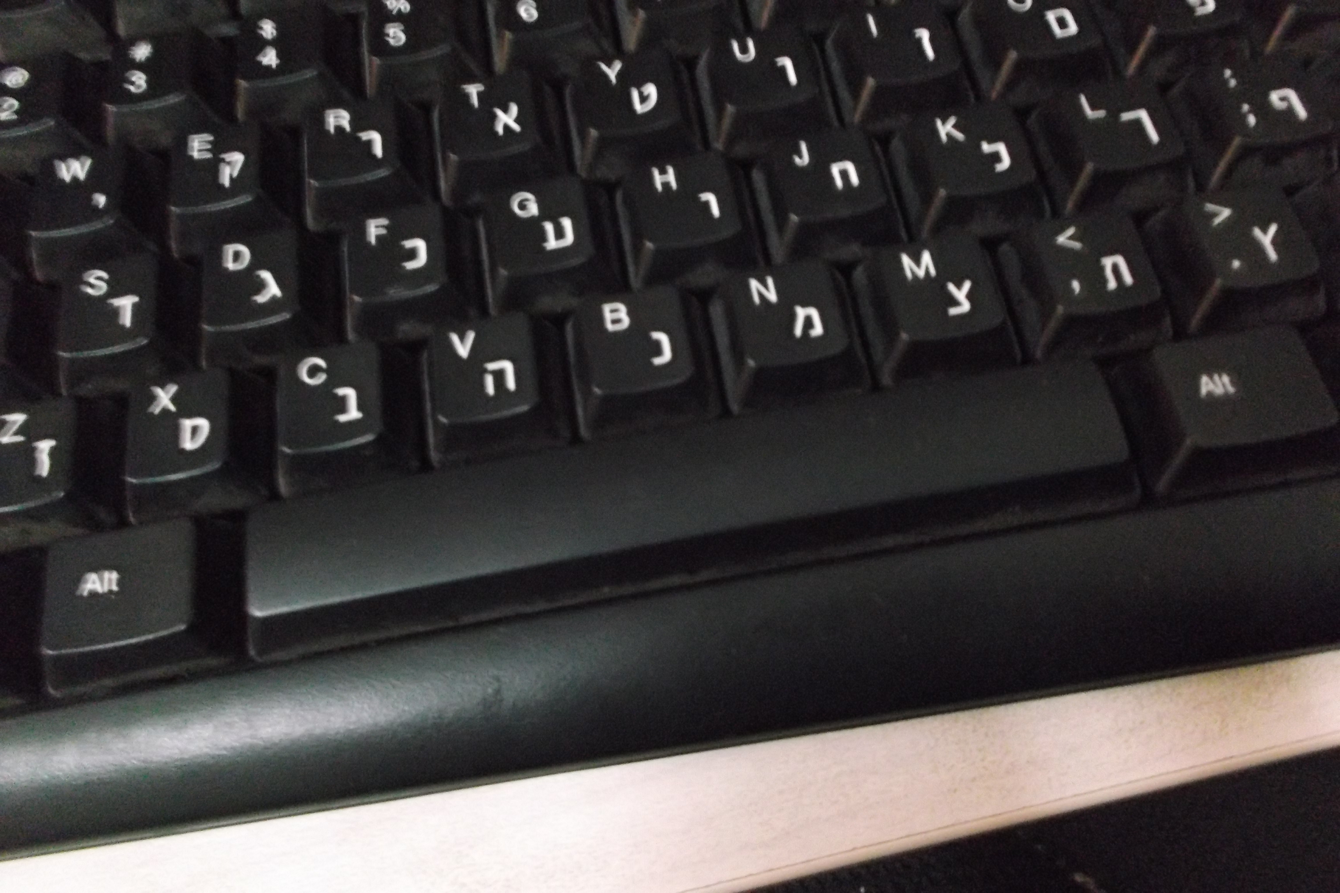 מקש הרווח במקלדת